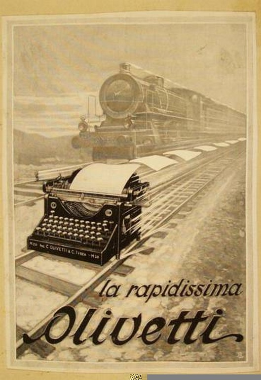 La rapidissima Olivetti, immagine pubblicitaria del modello di macchina da scrivere M 20 prodotto dalla Ditta Ing. C. Olivetti & C., 1923 (ACS, Ministero dell'industria, del commercio e dell'artigianato, Ufficio italiano brevetti e marchi, Marchi, fasc. 26093)